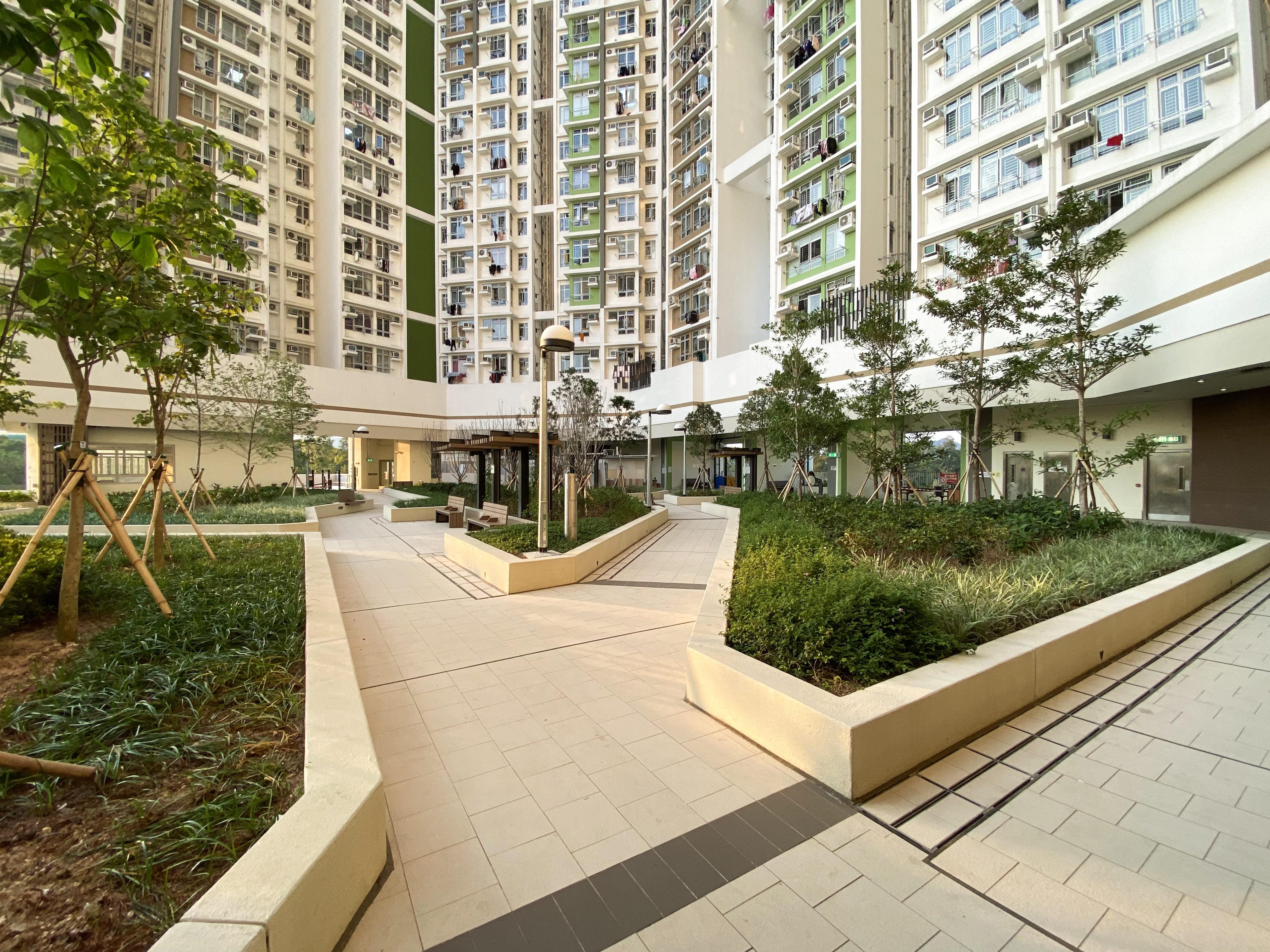 Po Shek Wu Estate Podium Garden